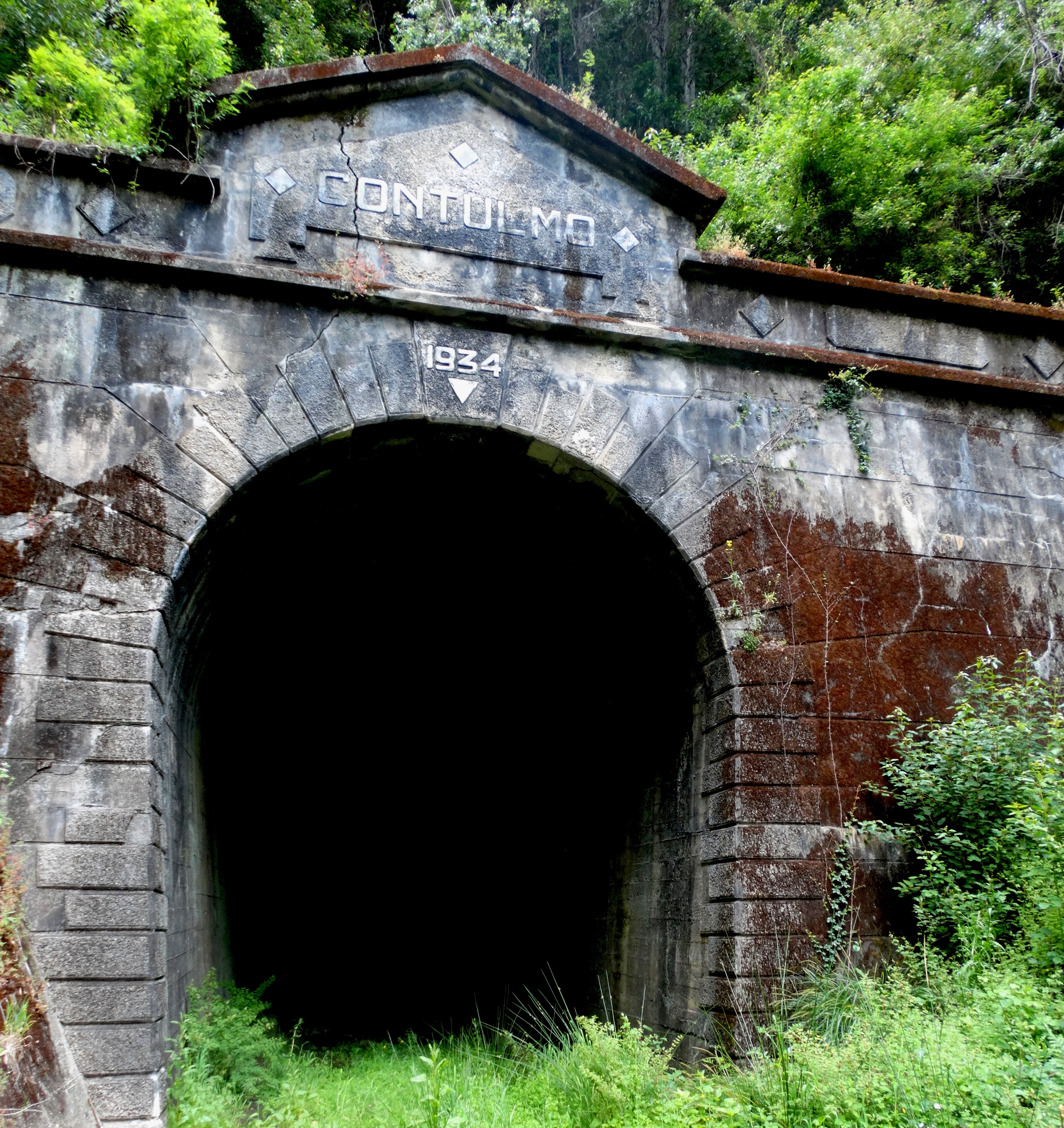 Túnel Contulmo 1934. Uno de los atractivos turísticos más impresionantes de Contulmo.